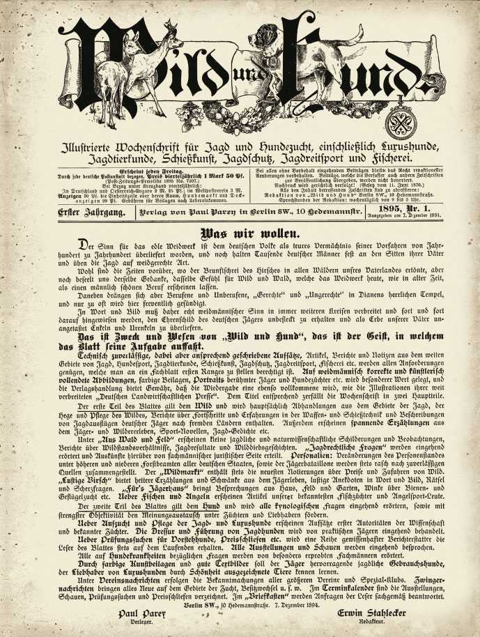 Titelblatt der Erstausgabe der Zeitschrift Wild und Hund 1/1895